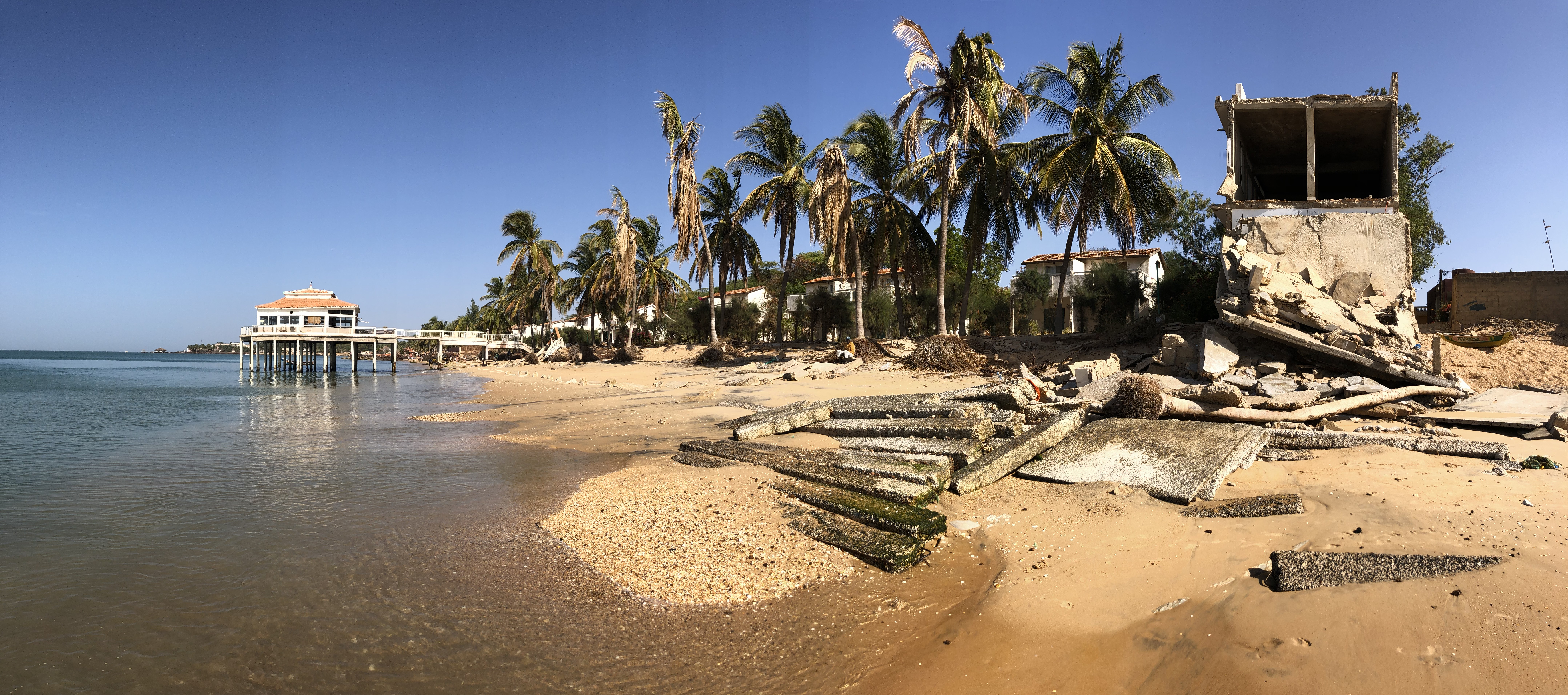 Panoramabild am Strand von Saly Portudal